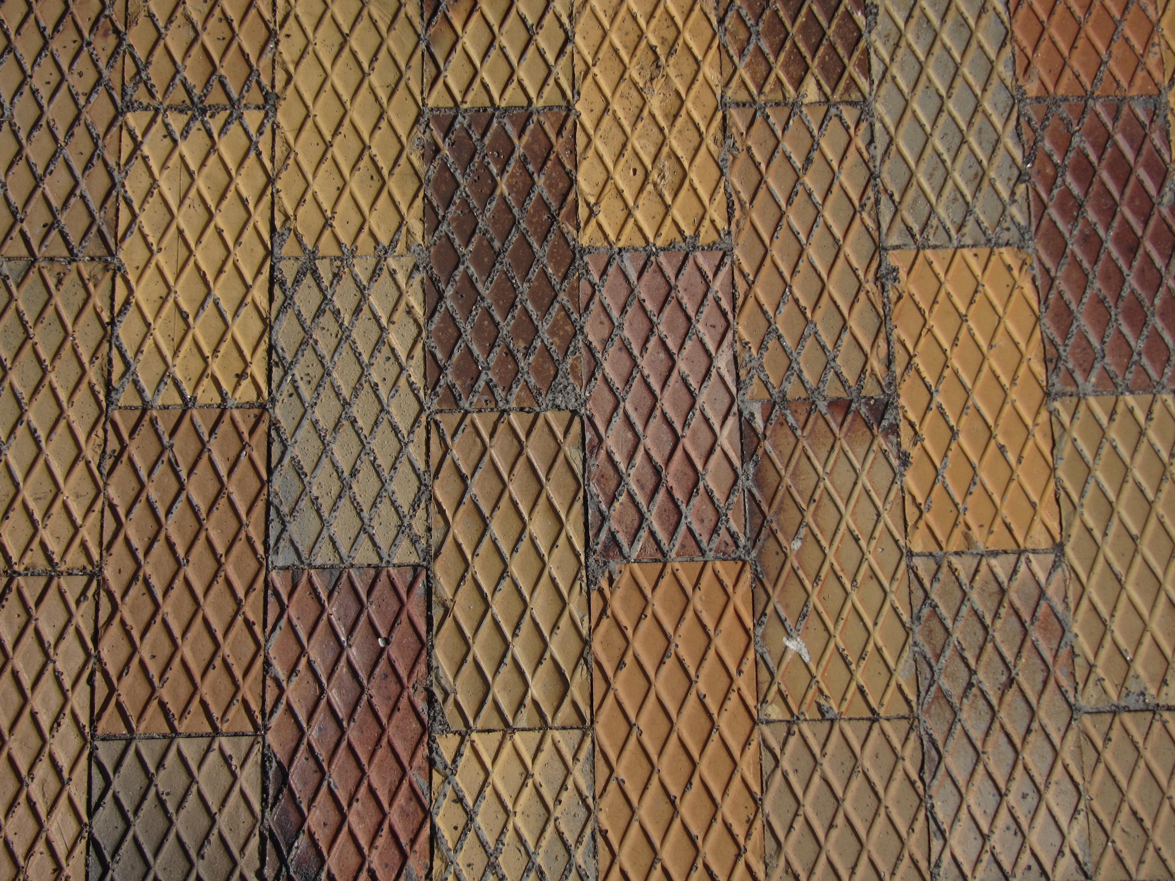 Hasle Klinker, fortov i Hasle by